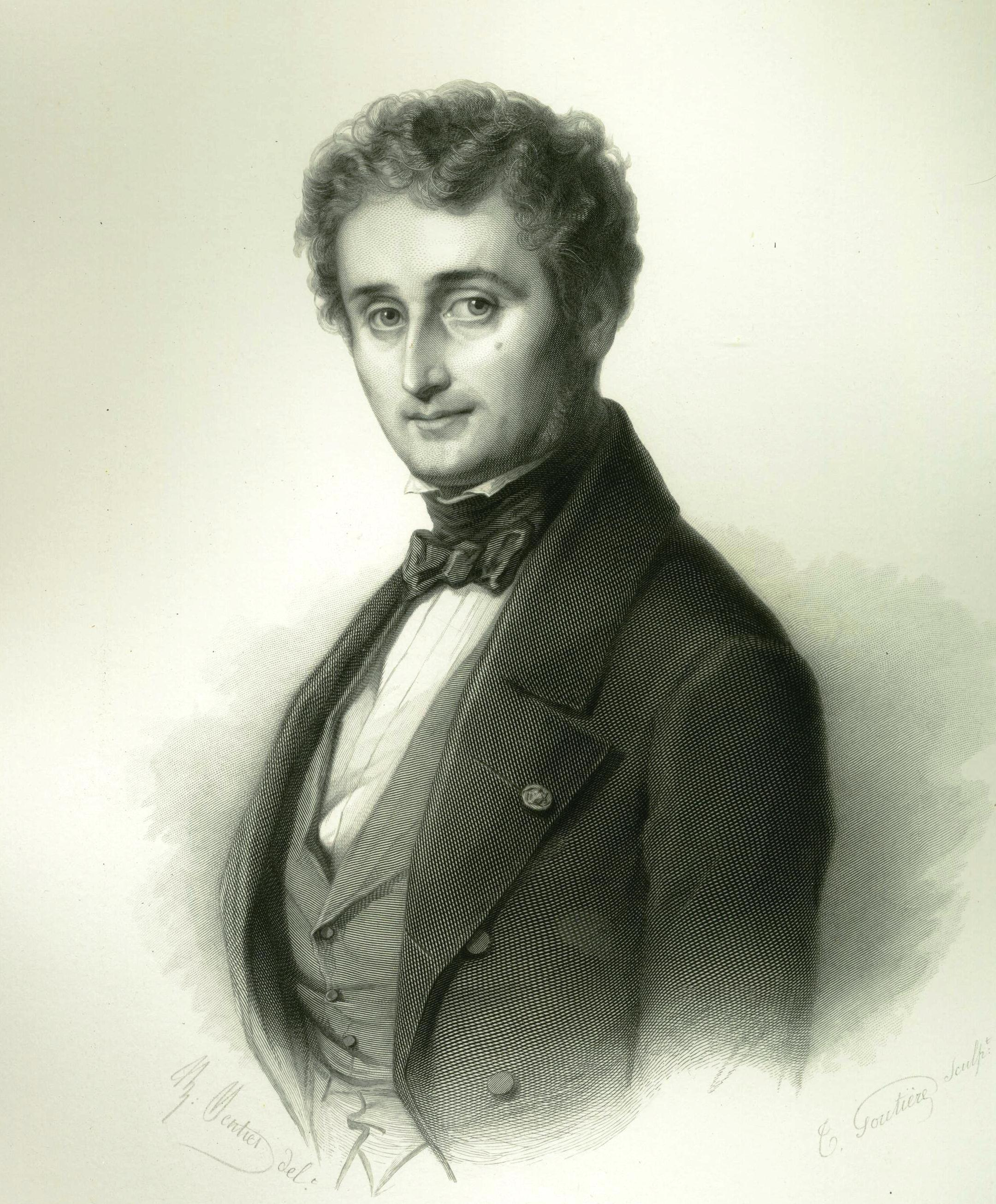 gravure